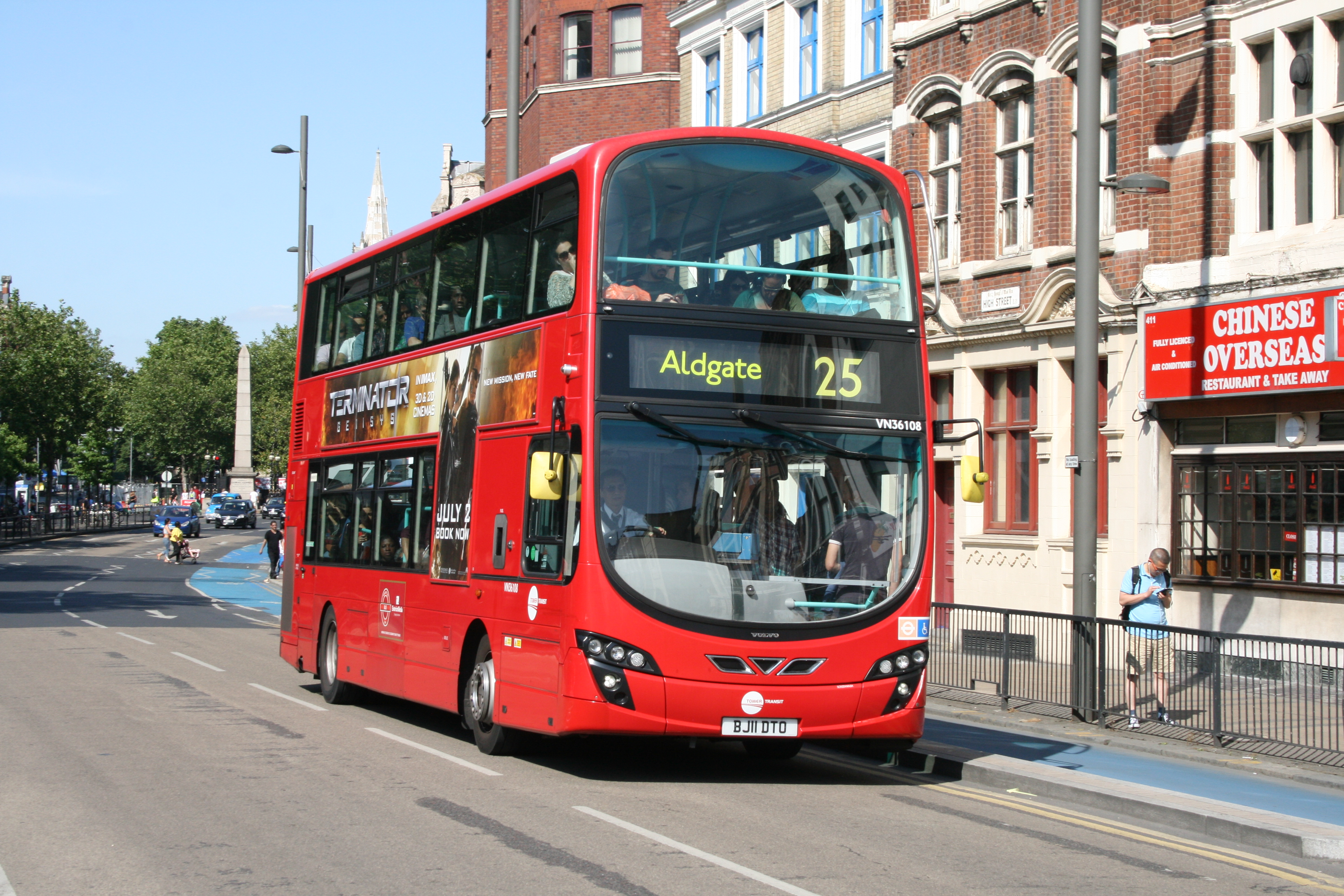 BJ11 DTO